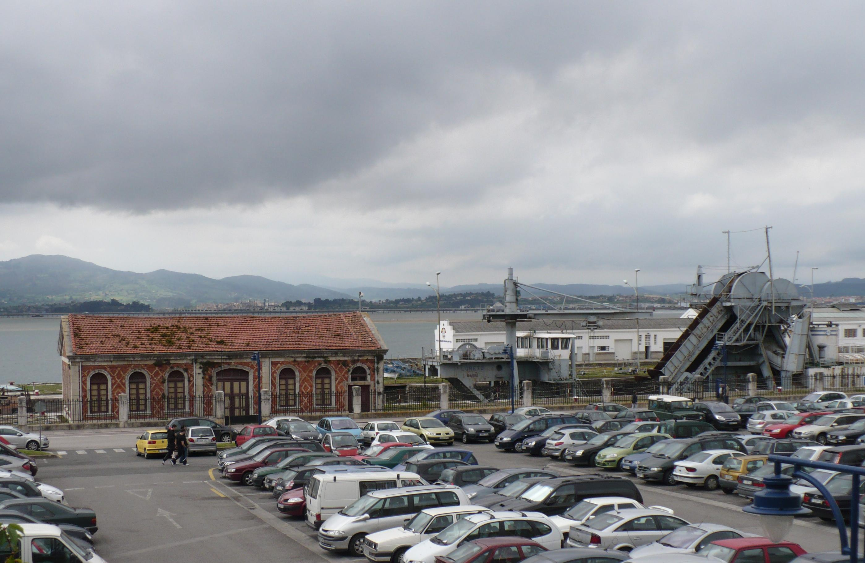 Dique de Gamazo (Santandé), Bien de Interés Cultural